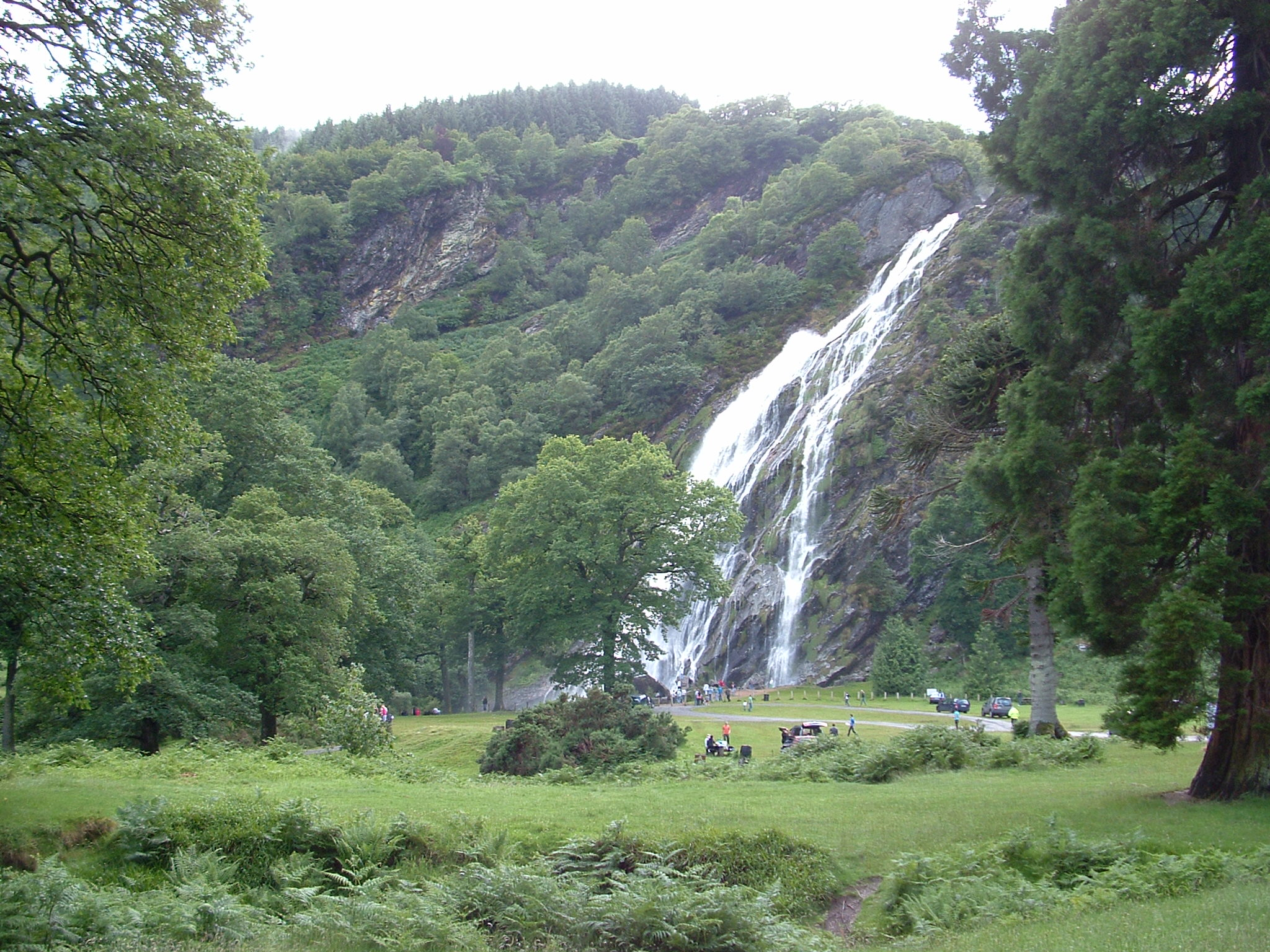 Power's Court Waterfall (5)